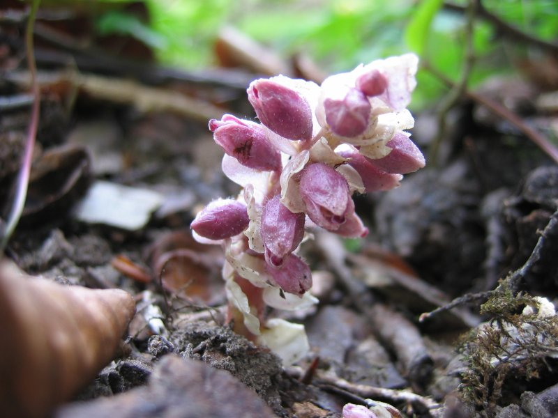 Schuppenwurz Lathraea squamaria, Pölchow bei Rostock